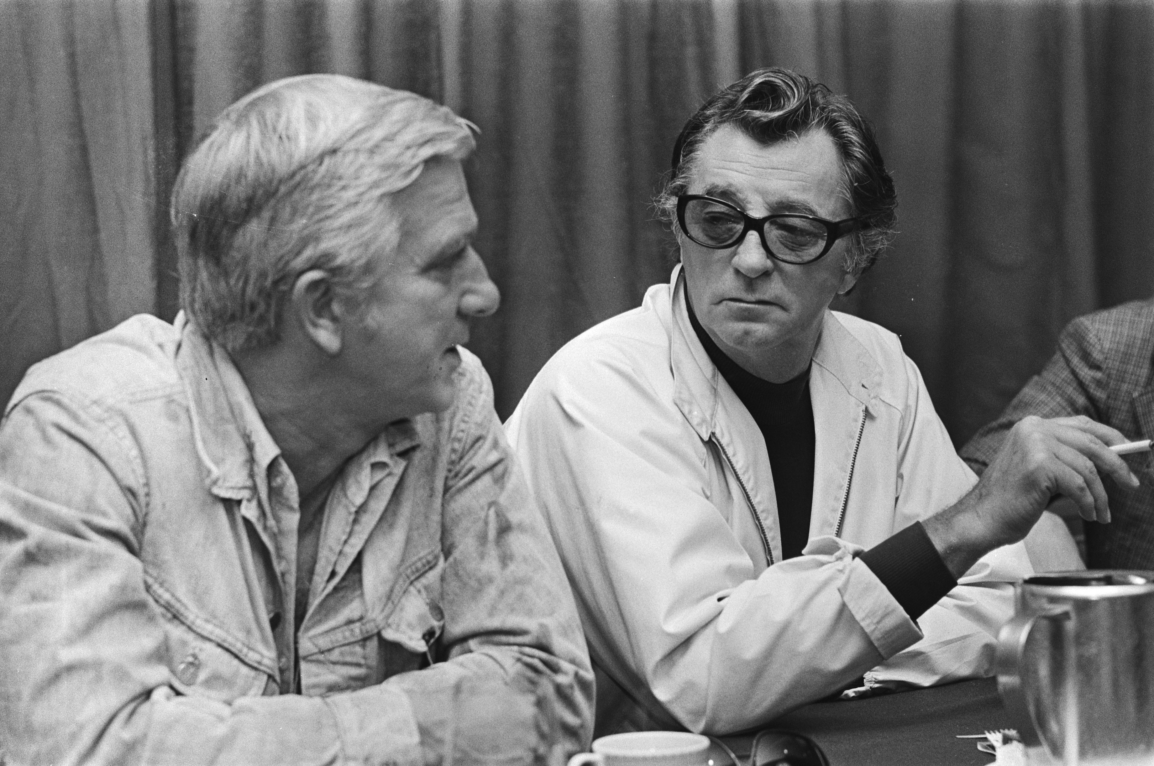 Collectie / Archief : Fotocollectie Anefo Reportage / Serie : [ onbekend ] Beschrijving : Robert Mitchum (rechts) en Leslie Nielsen geven persconferentie in Amsterdam Hilton i.v.m. film "The Amsterdam Kill" Annotatie : Werktitel film was "Sudden Death" Datum : 1 oktober 1976 Locatie : Amsterdam, Noord-Holland Trefwoorden : acteurs, films, filmsterren, persconferenties Persoonsnaam : Mitchum Robert, Nielsen Leslie Fotograaf : Suyk, Koen / Anefo Auteursrechthebbende : Nationaal Archief Materiaalsoort : Negatief (zwart/wit) Nummer archiefinventaris : bekijk toegang 2.24.01.05 Bestanddeelnummer : 928-8120